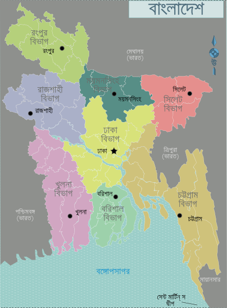 উইকিভ্রমণের জন্য বাংলাদেশের মানচিত্র